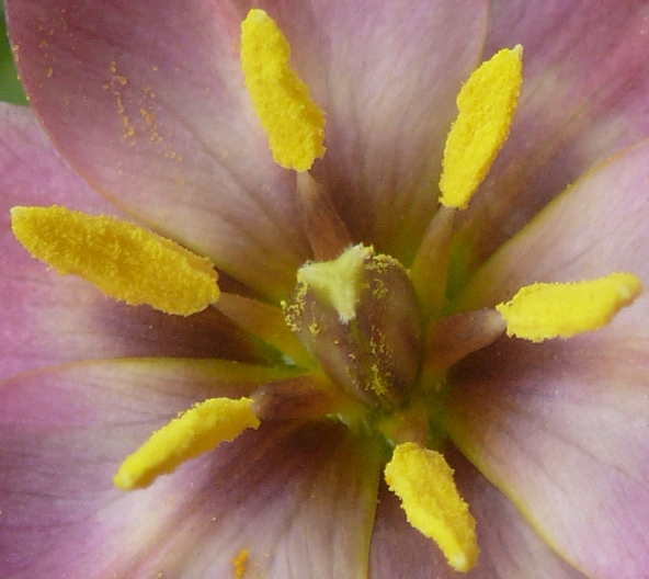 Tulipa aucheriana, garden